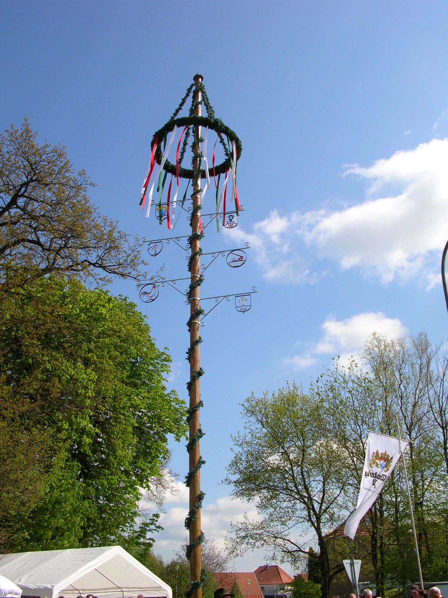 Bild vom Maibaum 2008 in Dreyen. Wappen am Maibaum - Reihenfolge (von links oben nach rechts unten): altes Wappen von Enger Alttraktorenverein Dreyen Sportverein Dreyen Feuerwehr Dreyen Geflügelzuchtverein Dreyen Schützenverein Dreyen